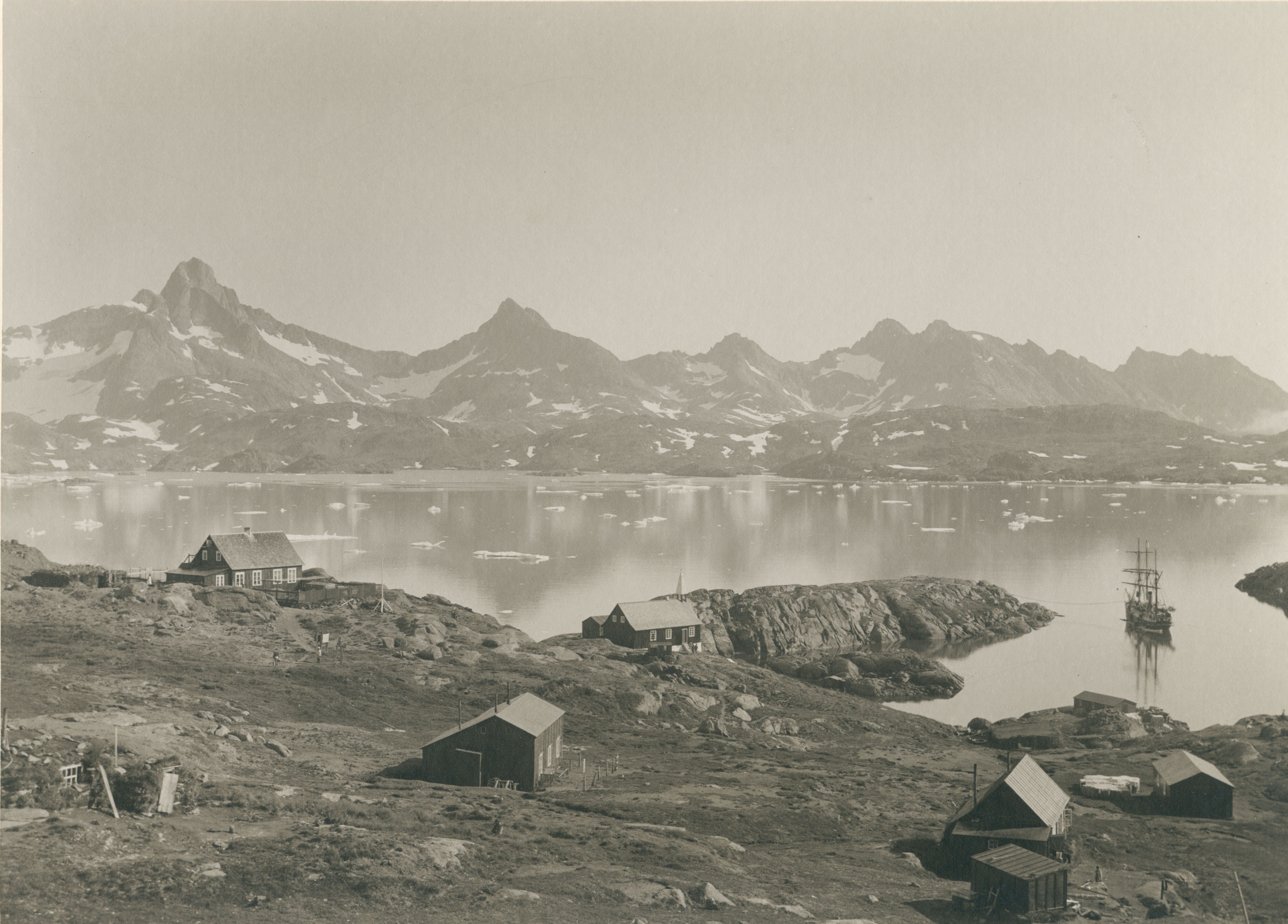 Ammassalik